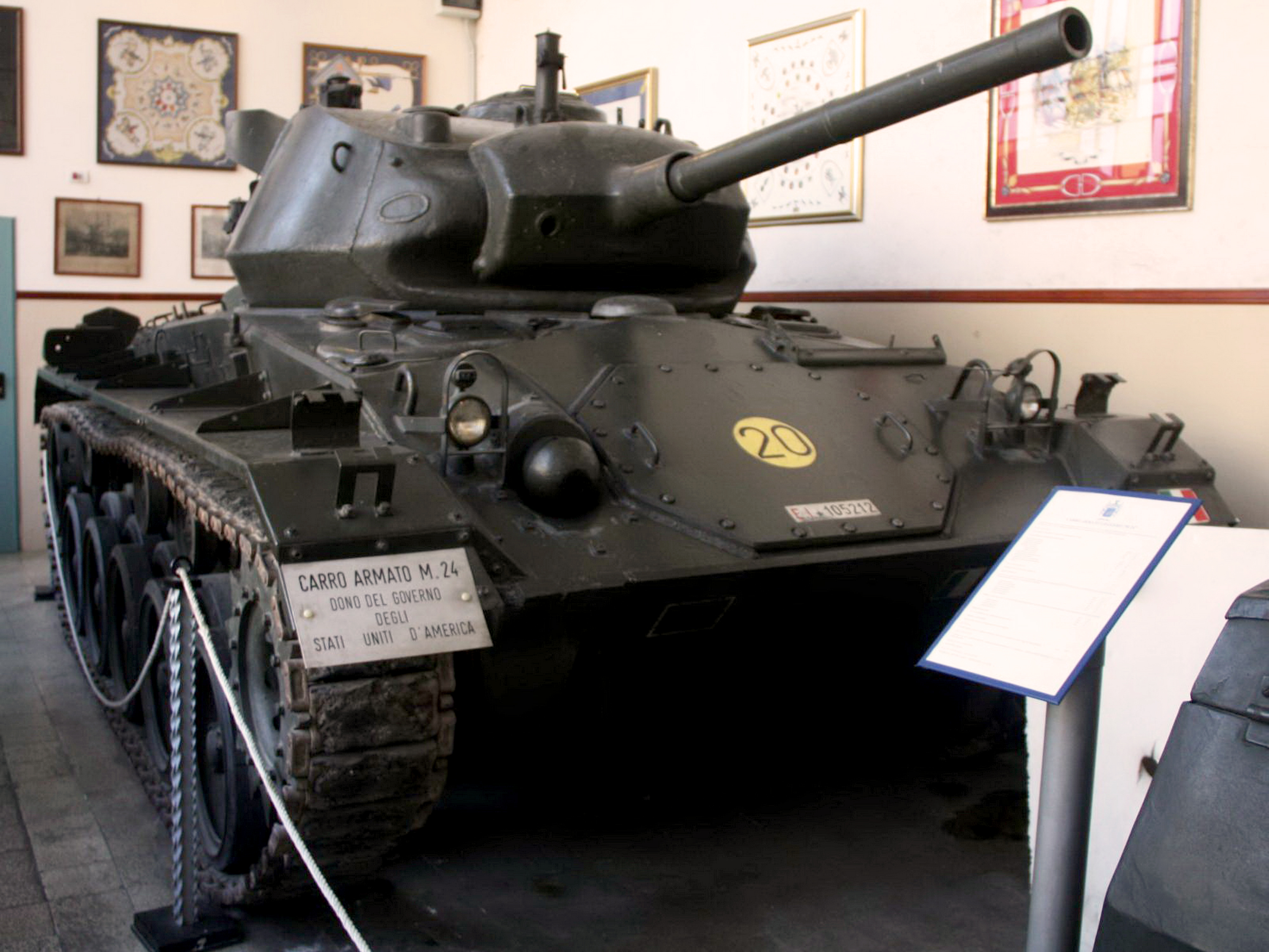 Carro armato M24 Chaffee dell'Esercito Italiano conservato presso il Museo storico dell'Armadi cavalleria di Pinerolo.